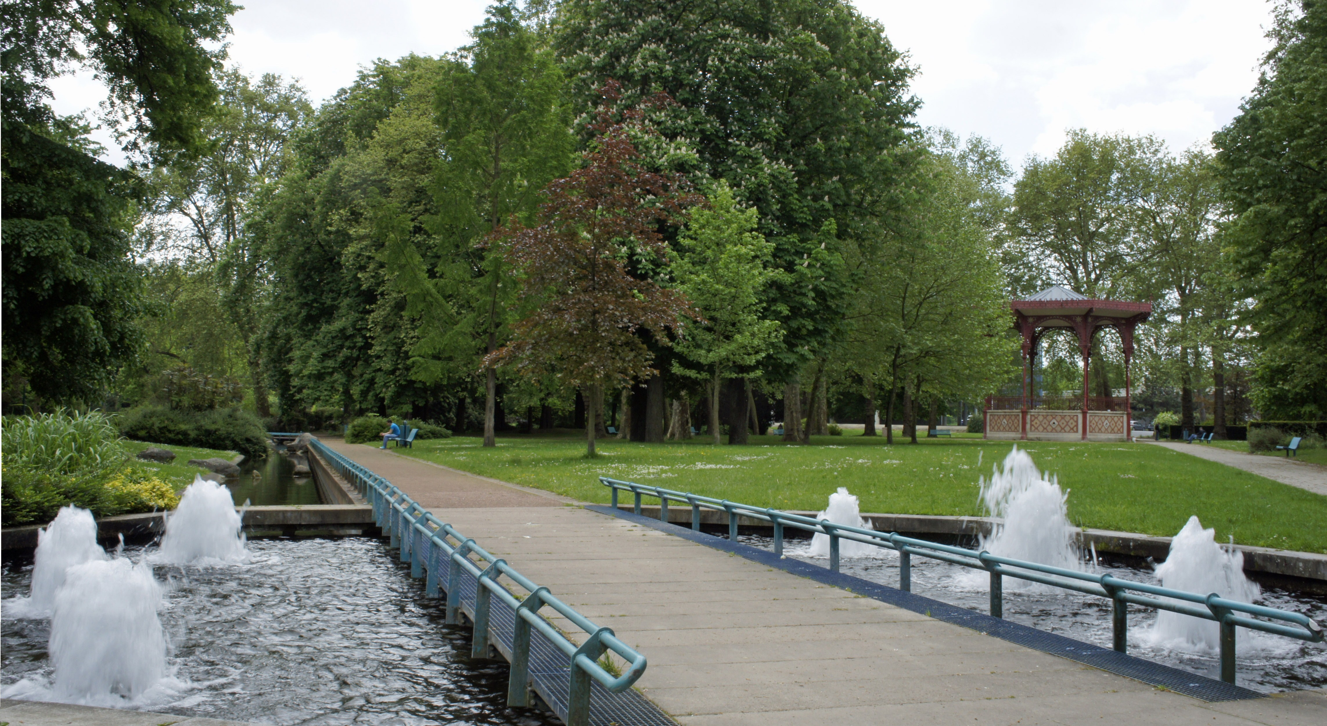 Jeux d'eau et kiosque dans le Parc de la patte d'oie.